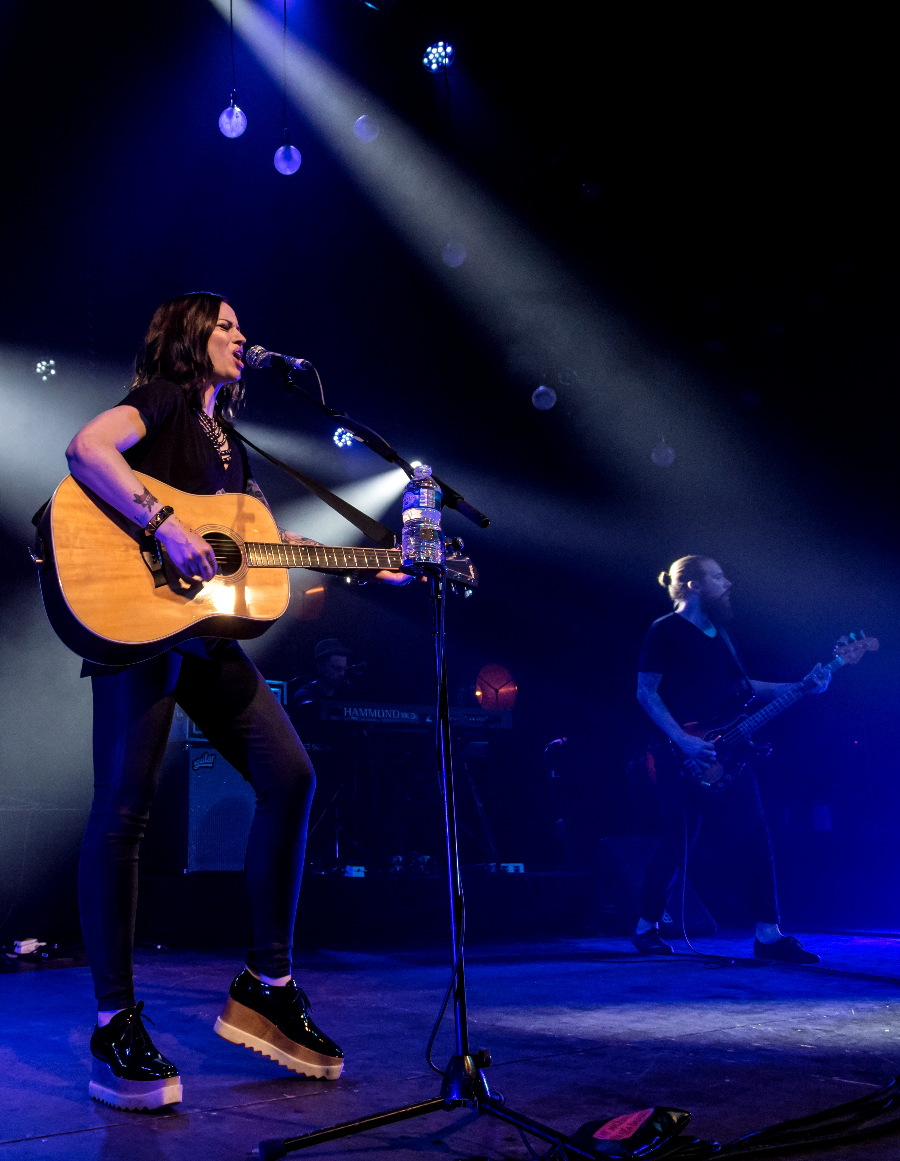 Bilder vom Zelt Musik Festival 2017 in Freiburg im Breisgau